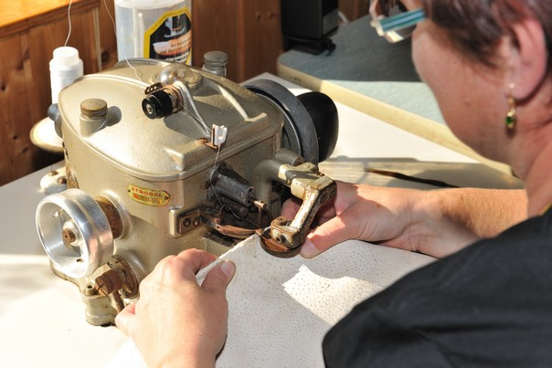 Reparieren von Schlachtschnitten an der Pelznähmaschine. Udo Meinelt & Söhne, Rötha